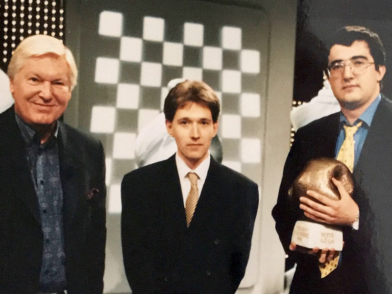 Der Sieger von 1998 (Kramnik-Adams 1-0) mit dem Siegerpokal der Sendung Schach der Großmeister des WDR.